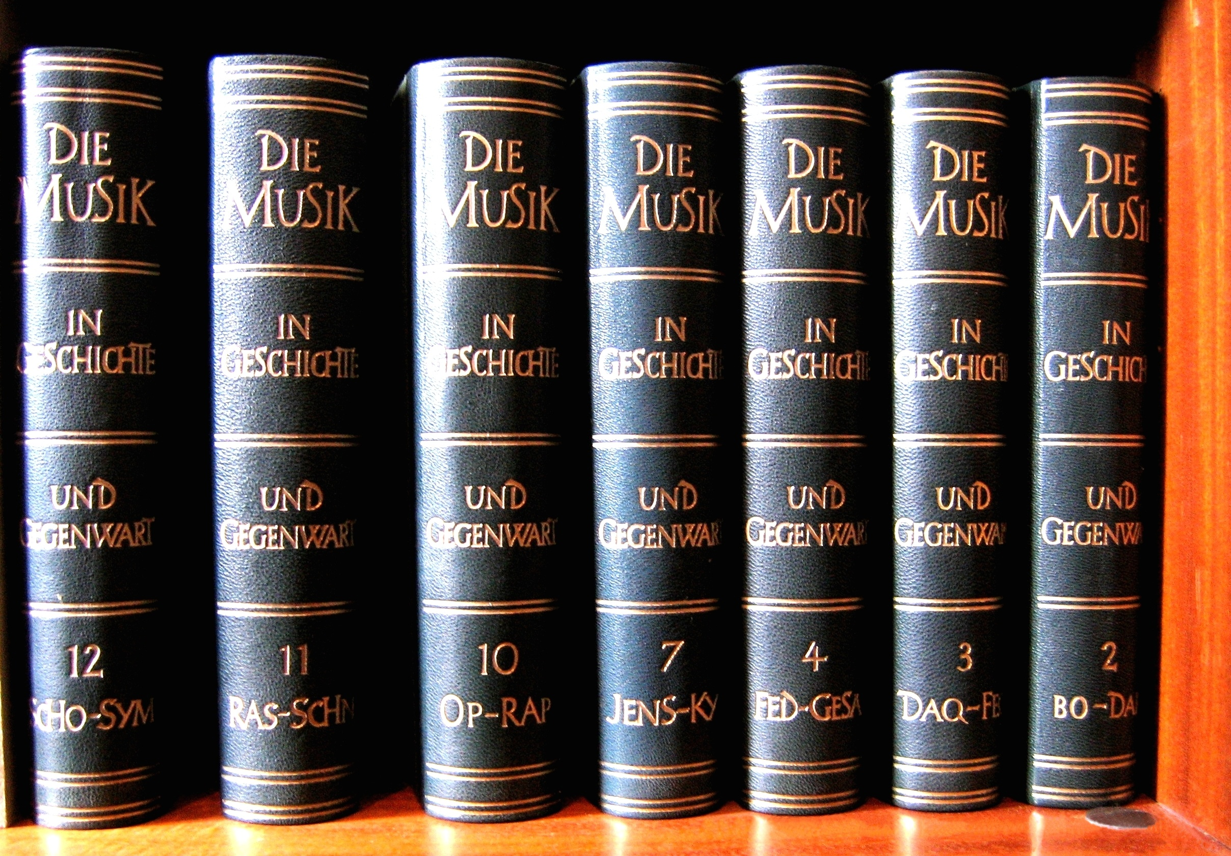 Quelques-uns des tomes de l'encyclopédie allemande : « die Musik in Geschichte und Gegenwart »